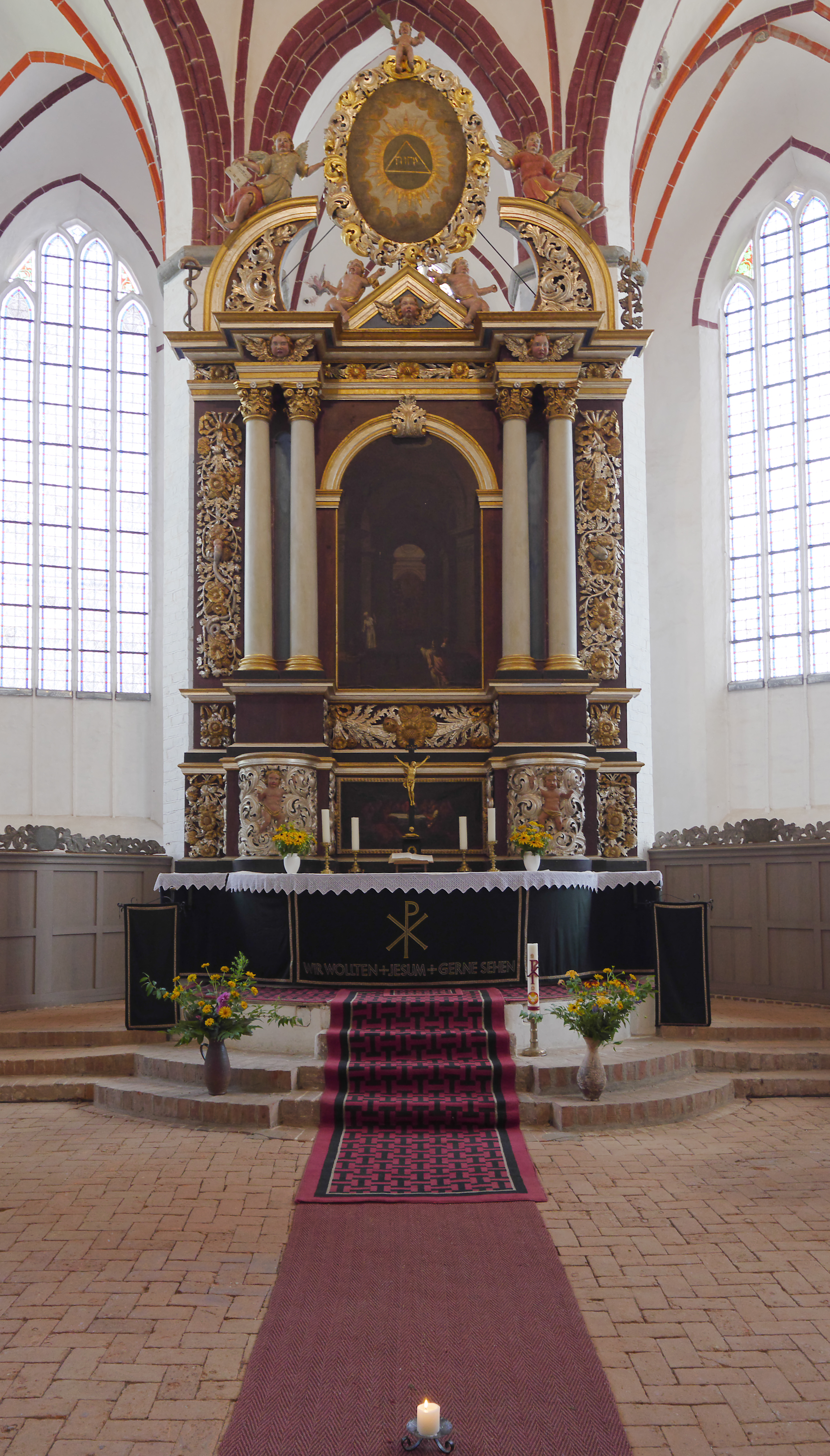 Nikolaikirche Jüterbog, Hochaltar